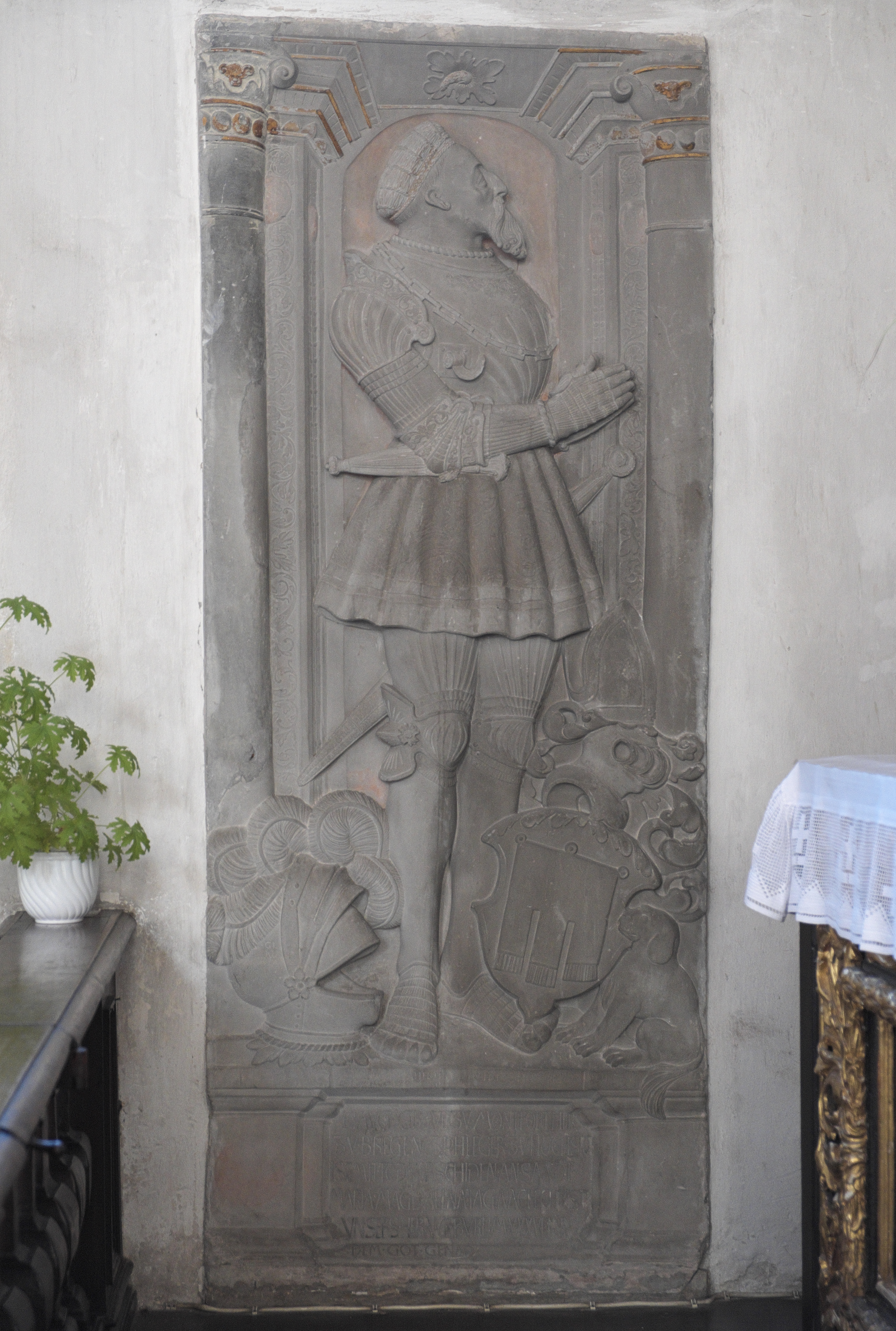 Katholische Stadtpfarrkirche Mariä Himmelfahrt in Höchstädt im Landkreis Dillingen an der Donau (Bayern), Epitaph für Haug Graf zu Montfort, gest. 1536